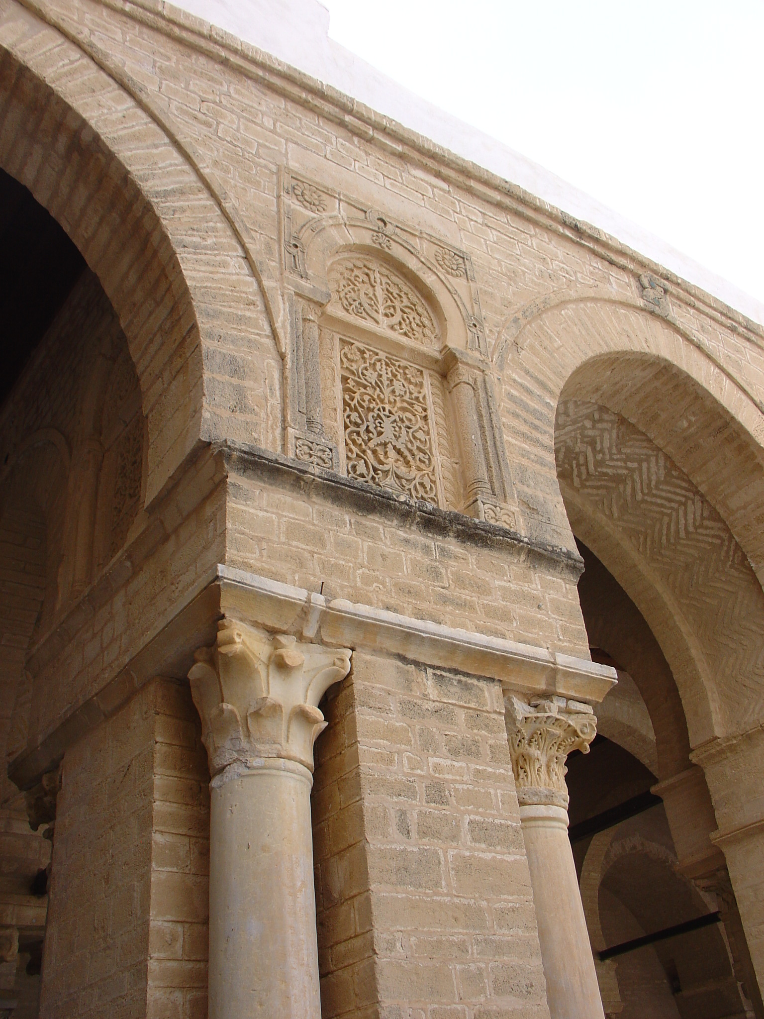 Panneau sculpté de motifs floraux entre deux arcs du portique occidental de la cour de la Grande Mosquée de Kairouan, en Tunisie.